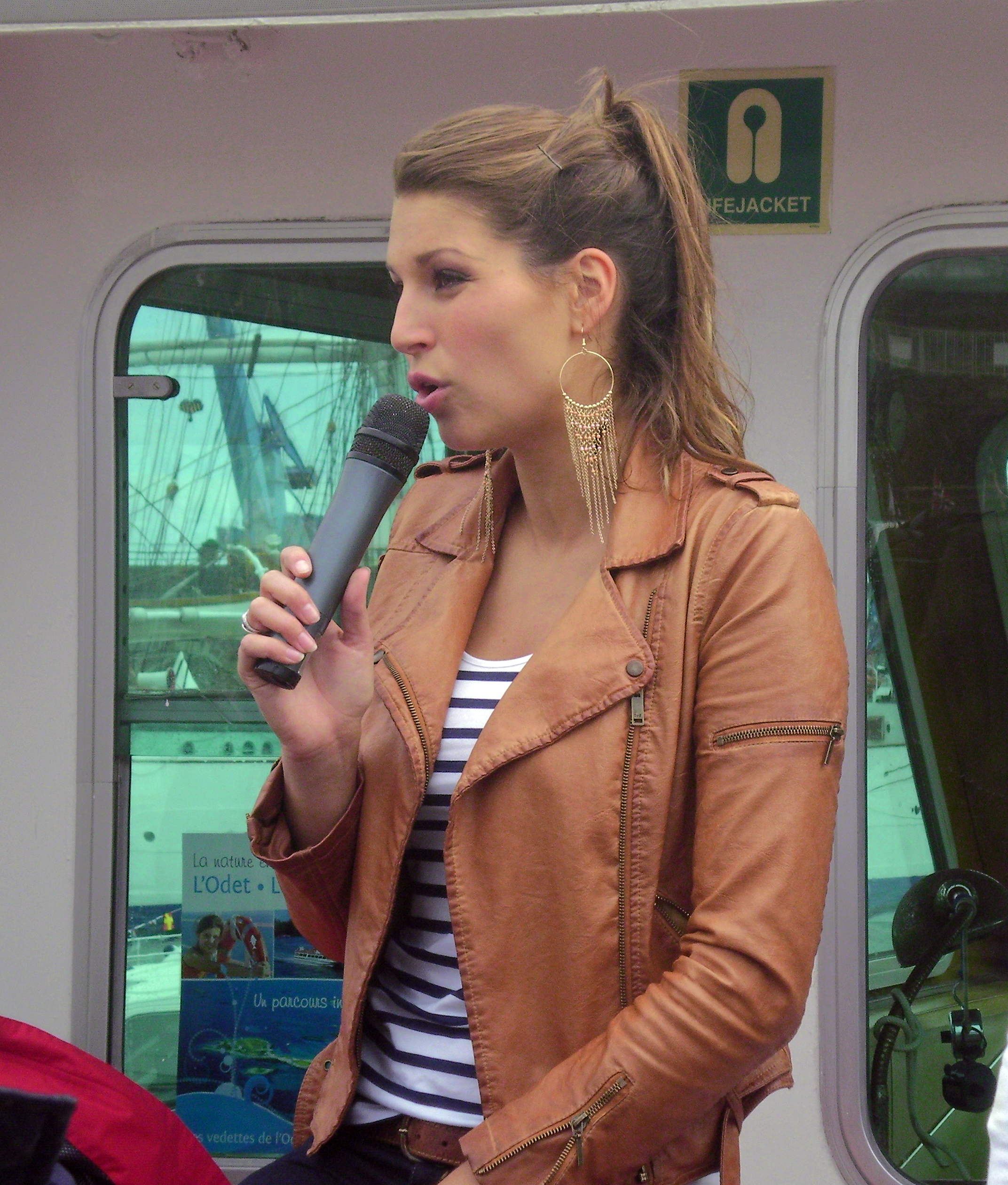 Laury Thilleman, représentante du Crédit Agricole pour les Tonnerres de Brest 2012.